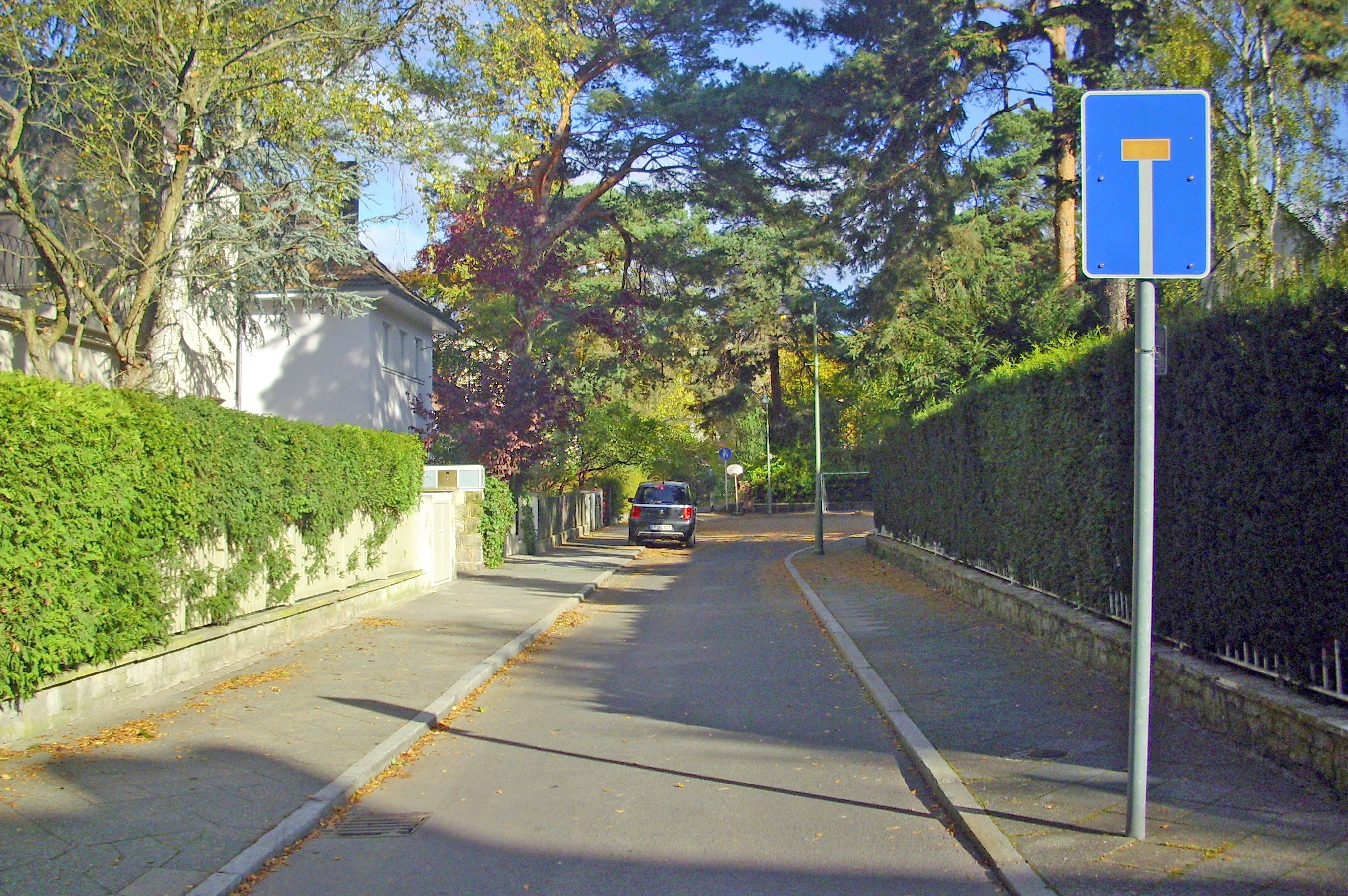 Merowingerweg in Berlin. Der Merowingerweg ist eine Sackgasse. Der Blick geht in die Sackgasse. Am Ende des Merowinger Wegs geht ein Fußweg bis zus Alemannenallee.